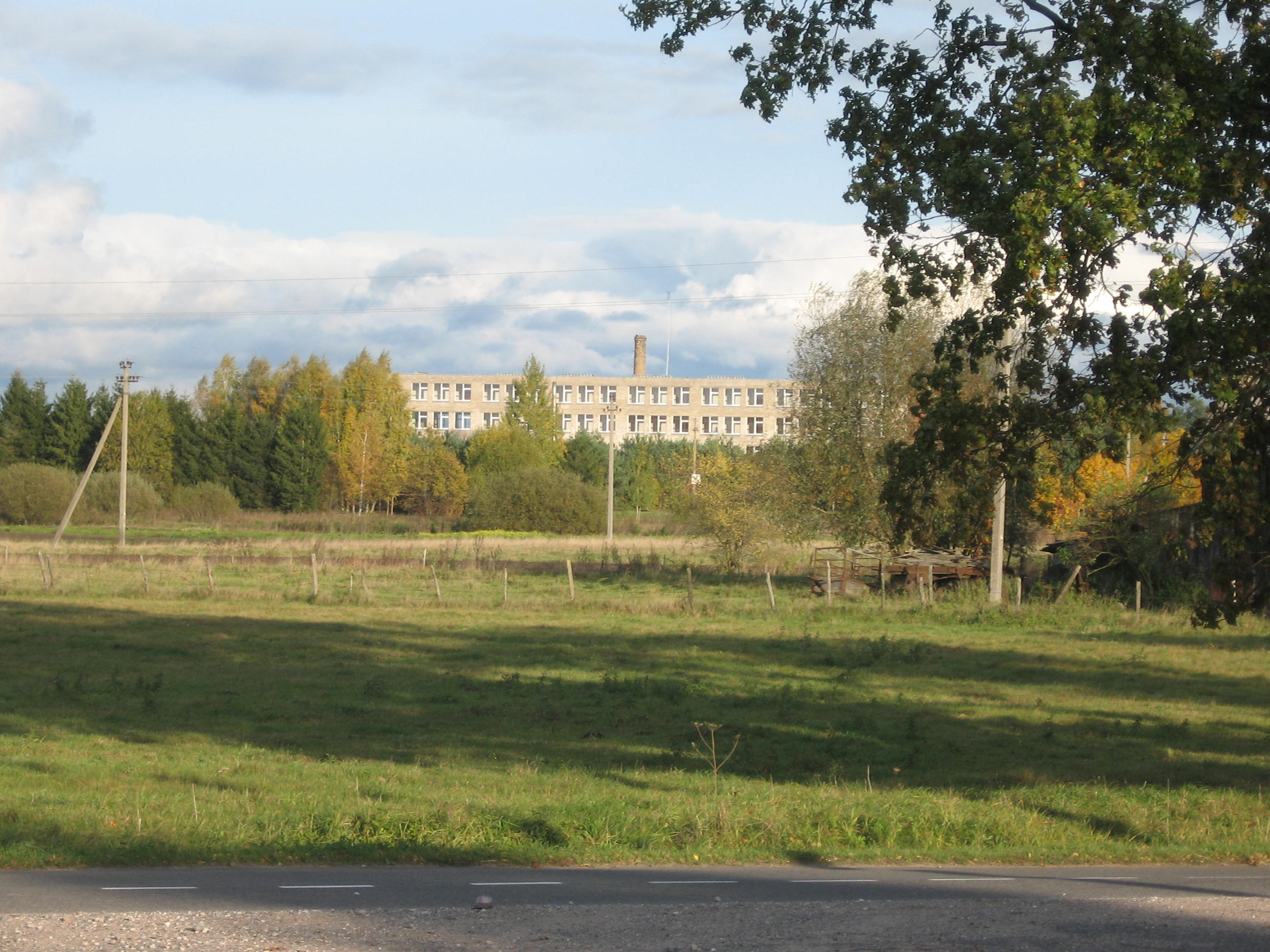 Katyčių pagrindinė mokykla